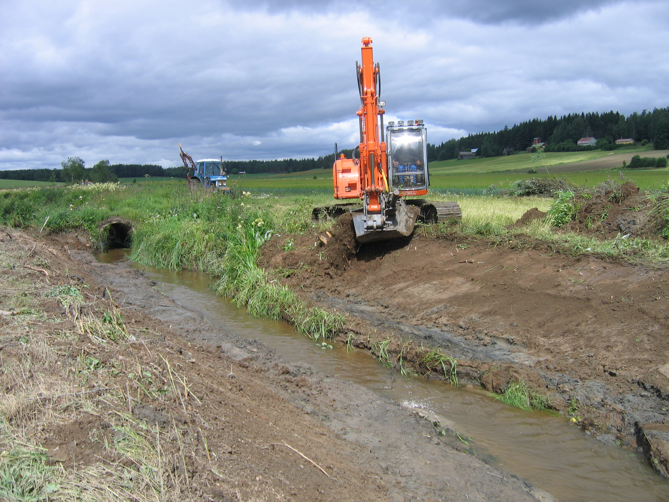 Juottimenojan kunnostus